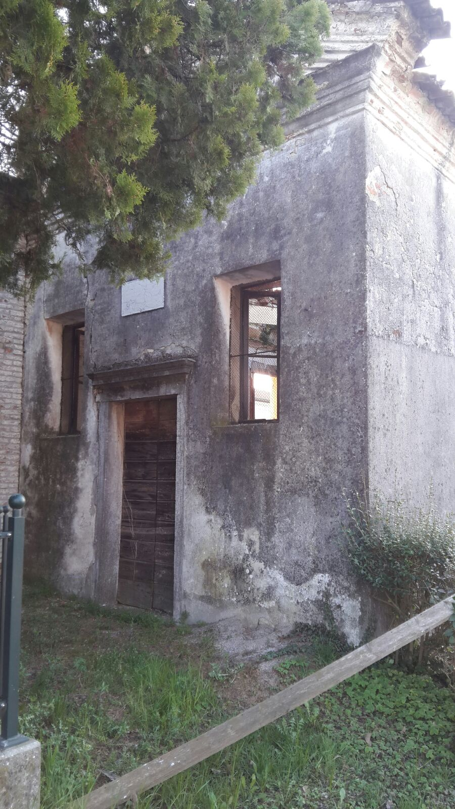 Oratorio